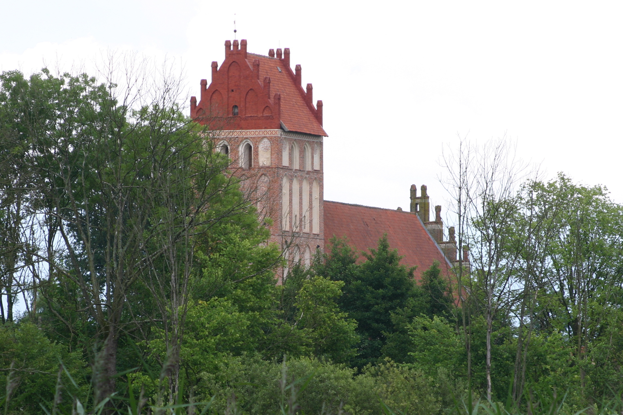 Mołtajny, Polska, powiat kętrzyński.